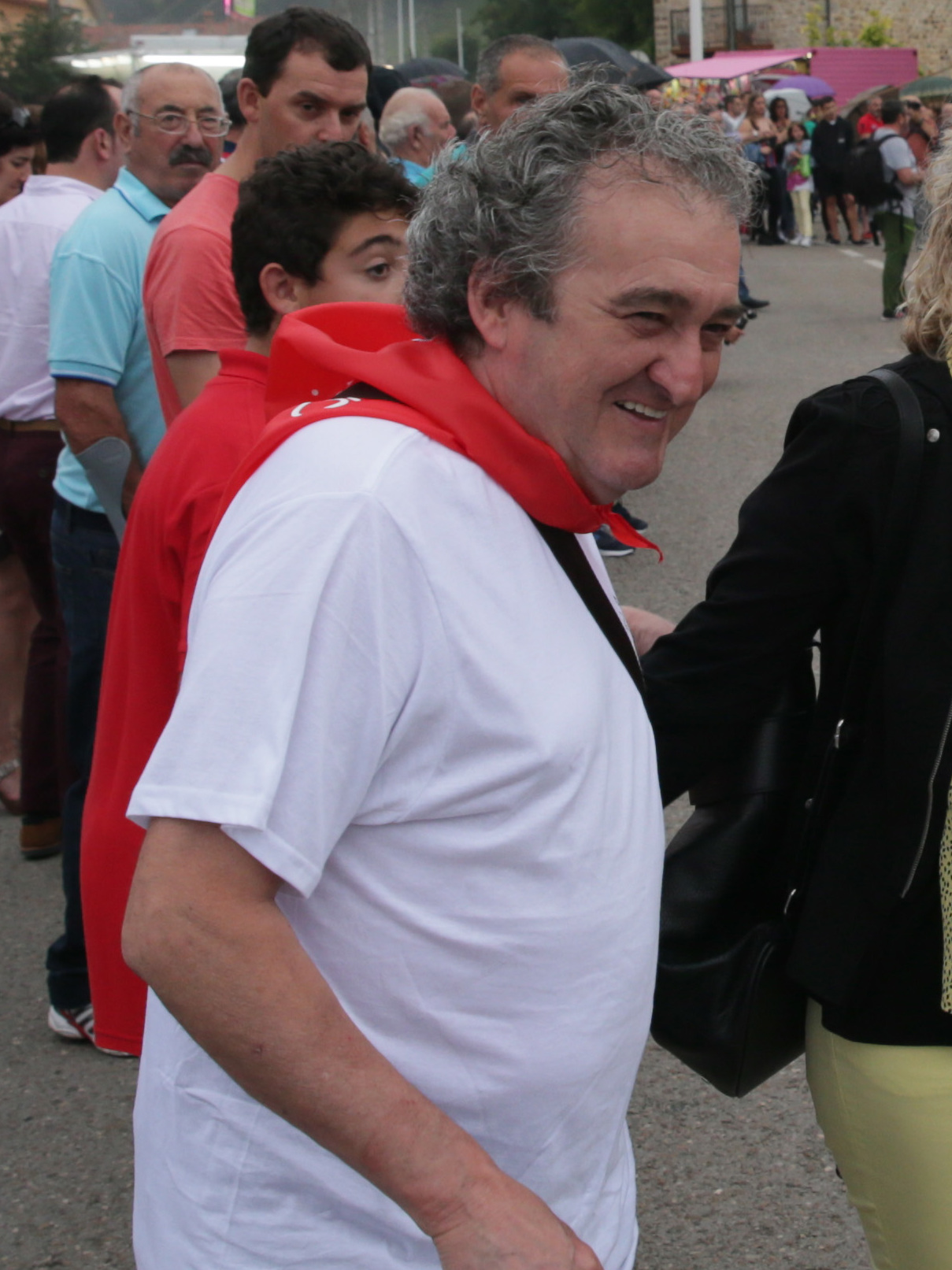 Eva Díaz Tezanos ha asistido, junto a centenares de personas, a la celebración de la Fiesta de la Maya en Silió